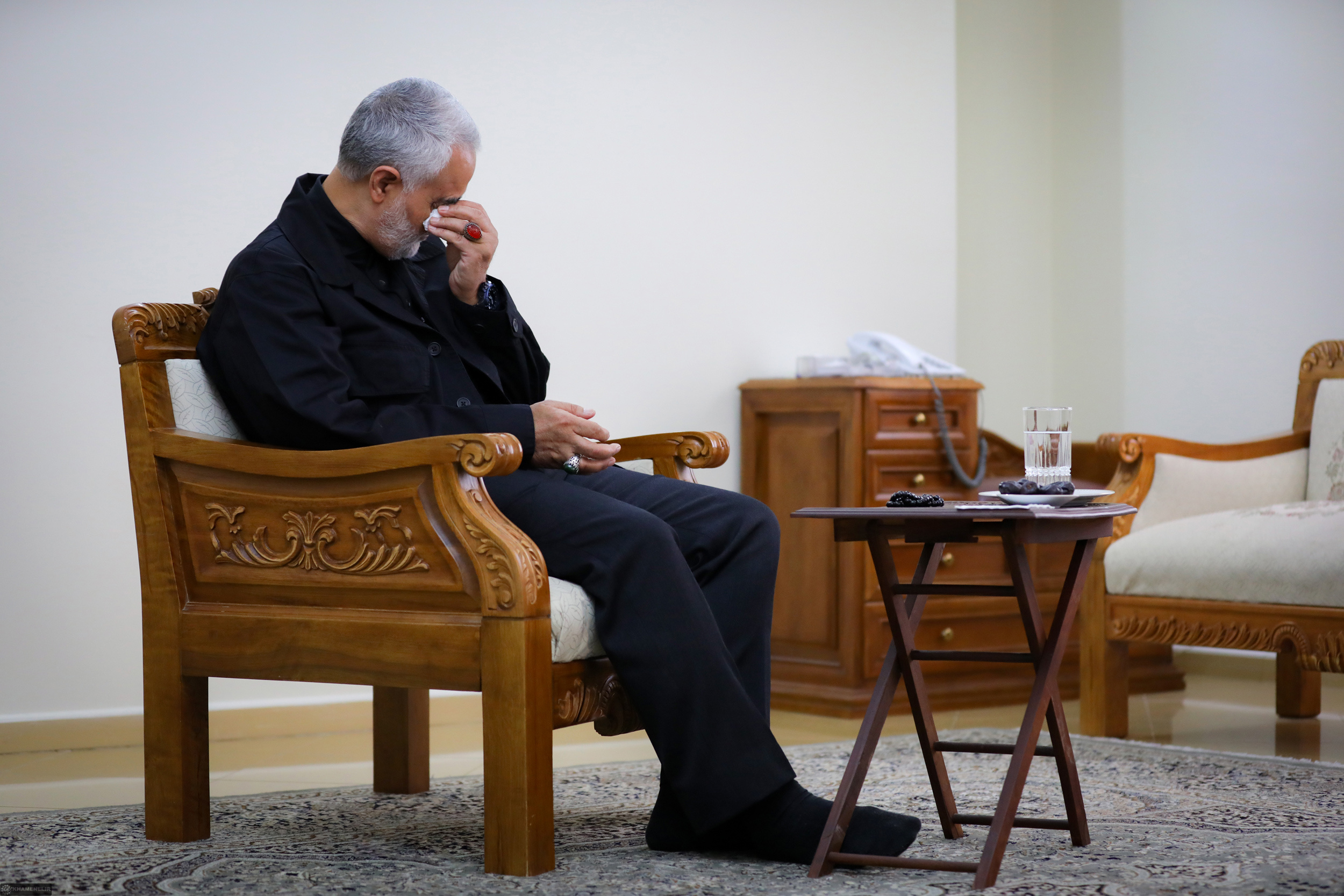 قاسم سلیمانی